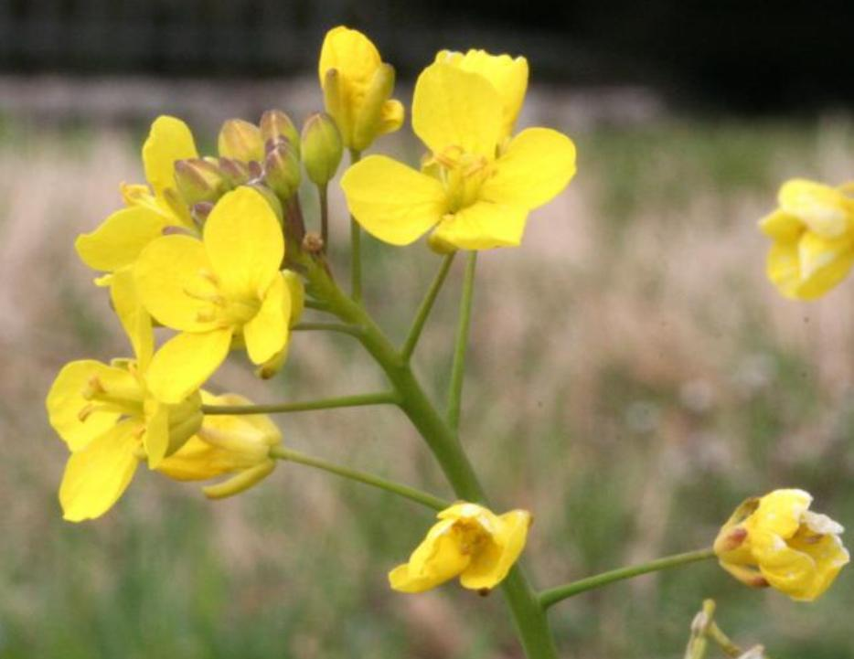 Biscutella laevigata